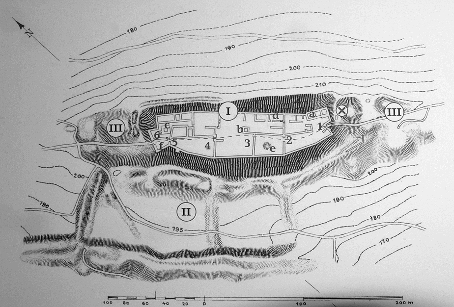 Lageplan der Asseburg (veröffentlicht in P. J. Meier: Die Kunstdenkmale des Kreises Wolfenbüttel , 1906) I= Hauptburg, II=Vorburg, III=Gräben und Wälle, Tore (1-6), Türme (a-c), Keller (d), Zisterne (e), Zwinger (f), (X) Standort des Schildes